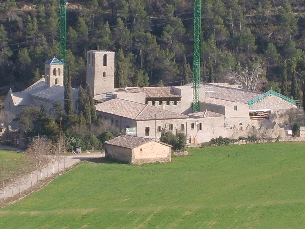 Monestir de Sant Benet de Bages